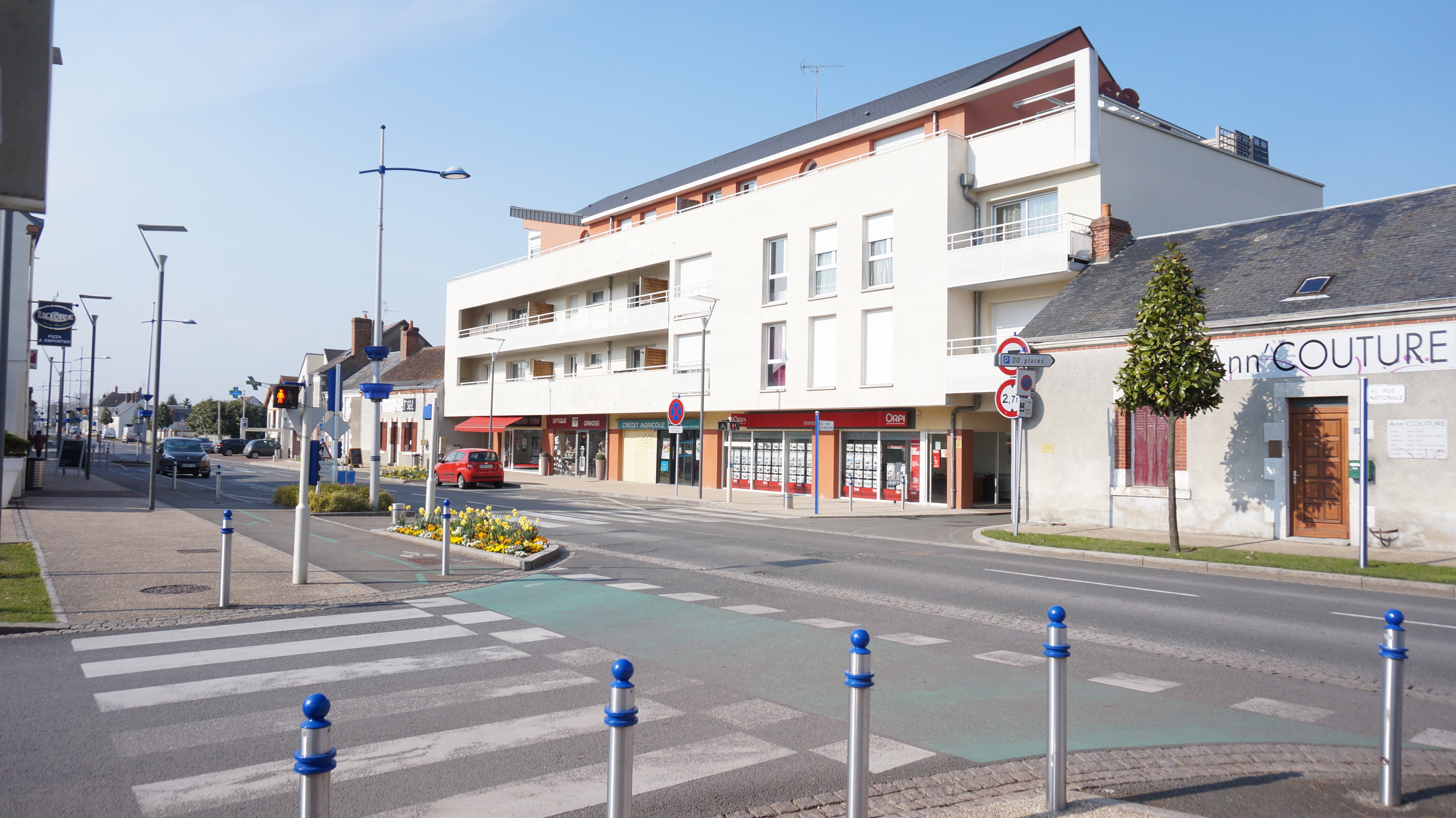 Quelques commerces situées dans la ville de Ormes, dans le département français du Loiret.